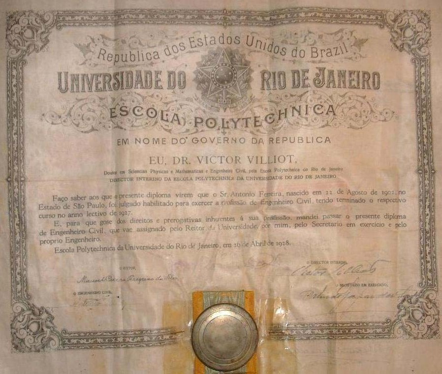 Diploma da Escola Polytechnica da Universidade do Rio de Janeiro em 1928.